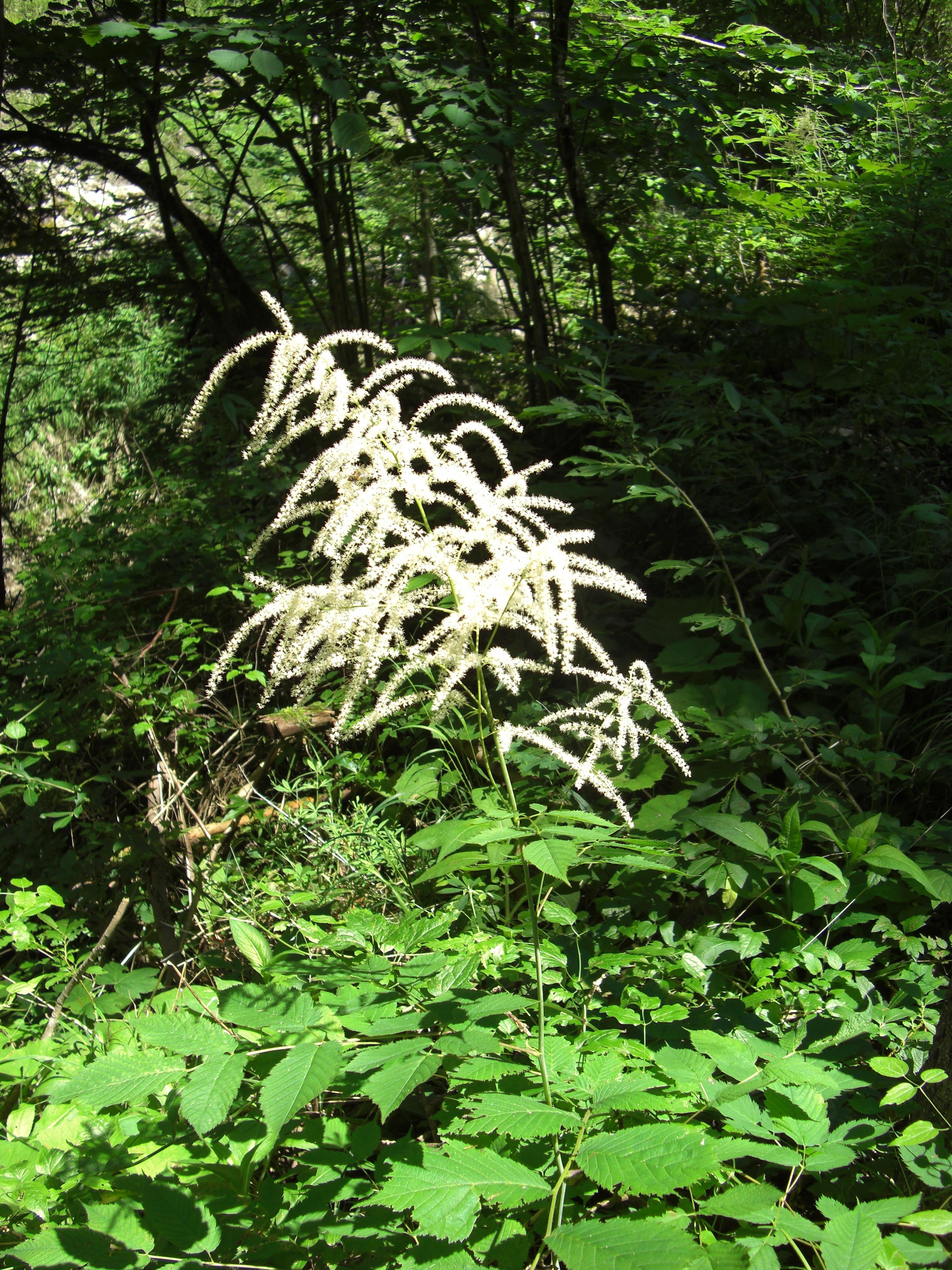 Wald-Geißbart (Aruncus dioicus) in der Glasenbachklamm